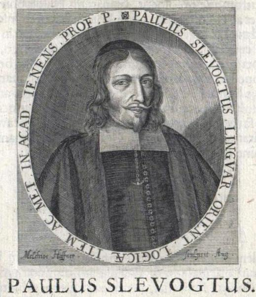 Paul Slevogt (1596–1655), deutscher Philologe. Kupferstich